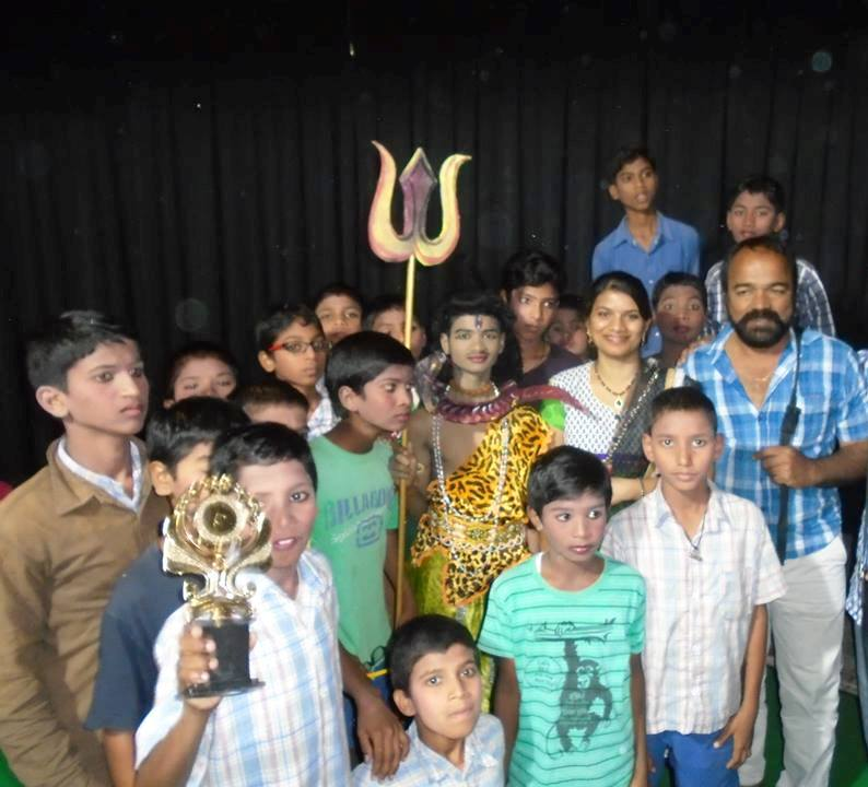 పిల్లలతో మల్లేశ్ బలష్టు